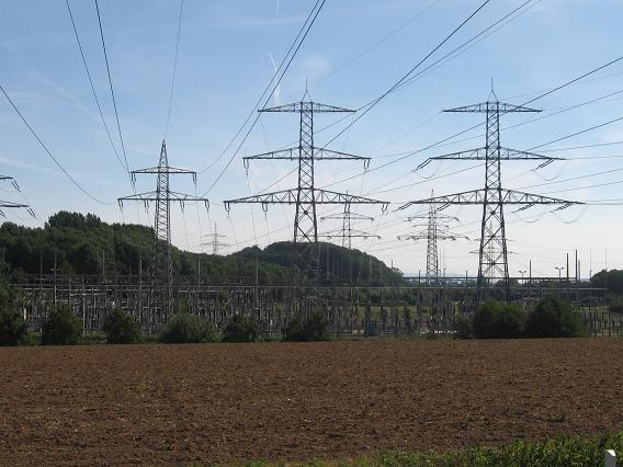 Porta Westfalica – Umspannwerk Veltheim, Blick von Westen